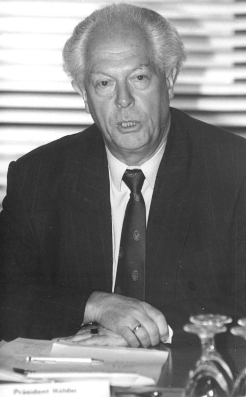 Egon Hölder ADN-ZB Grimm 26.10.90 cmv Berlin: Unter Leitung des Bundeswahlleiters Egon Hölder, Präsident des Statistischen Bundesamtes, trat der Bundeswahlausschuß im Reichstag zu seiner ersten Sitzung zusammen.